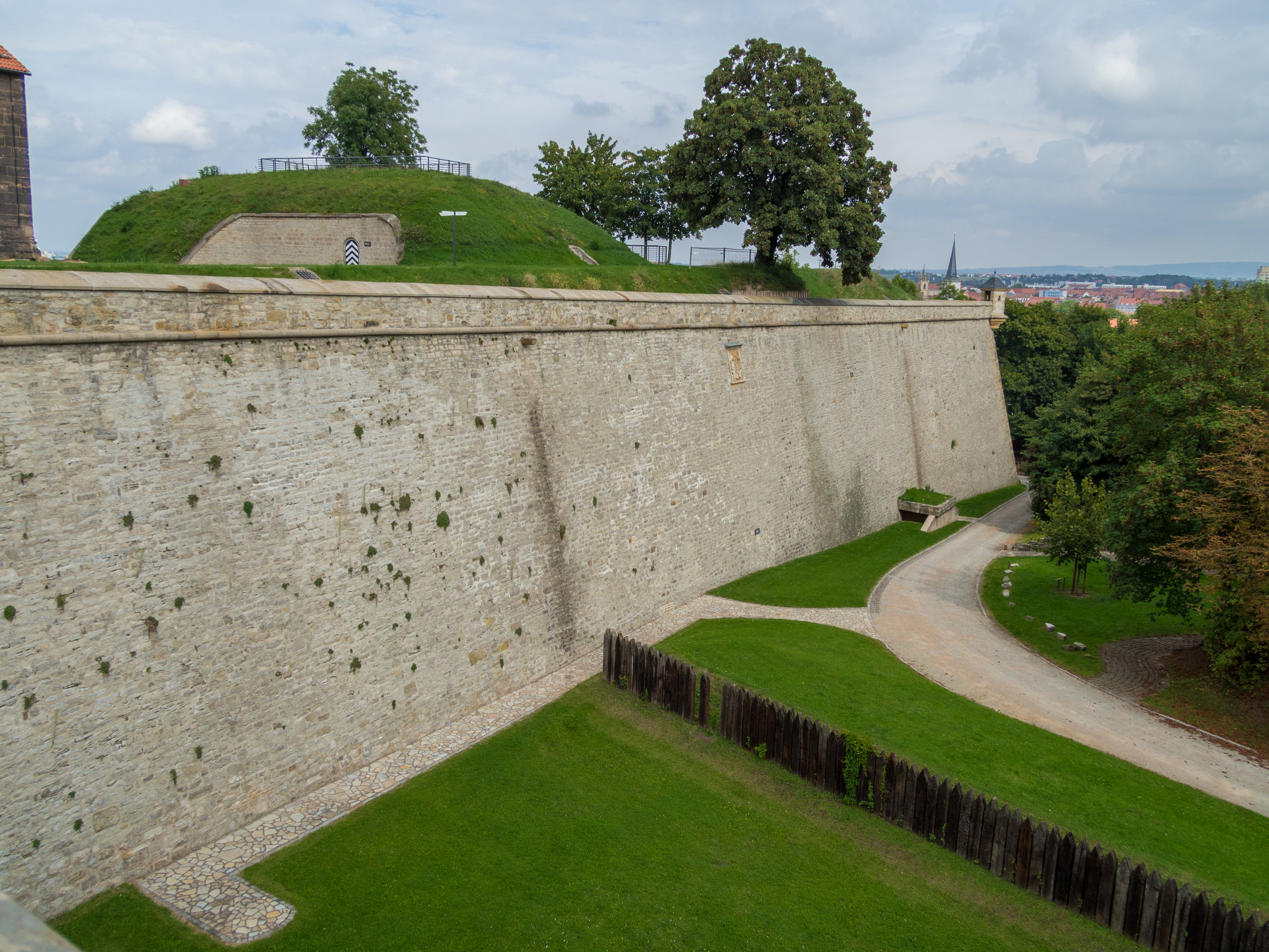 WLM-Fototour Erfurt 2014 Dieses Foto wurde im Rahmen der WLM-Fototour 2014 in Erfurt erstellt, die vom 29. bis 31. August 2014 zum Auftakt des Wettbewerbs Wiki Loves Monuments 2014 statt fand. The making of this document was supported by the Community-Budget of Wikimedia Germany. Zitadelle Petersberg in Erfurt